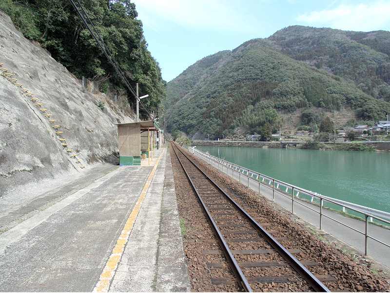 JR肥薩線吉尾駅 ホーム 写真奥が八代駅方面。写真右手は球磨川。 撮影者/著者/著作権保有者 : MK Products (本人がアップロード) 撮影日 : 2007/03/01 吉尾駅用にアップロードした画像です。良い画像があれば別の画像に変えてください。